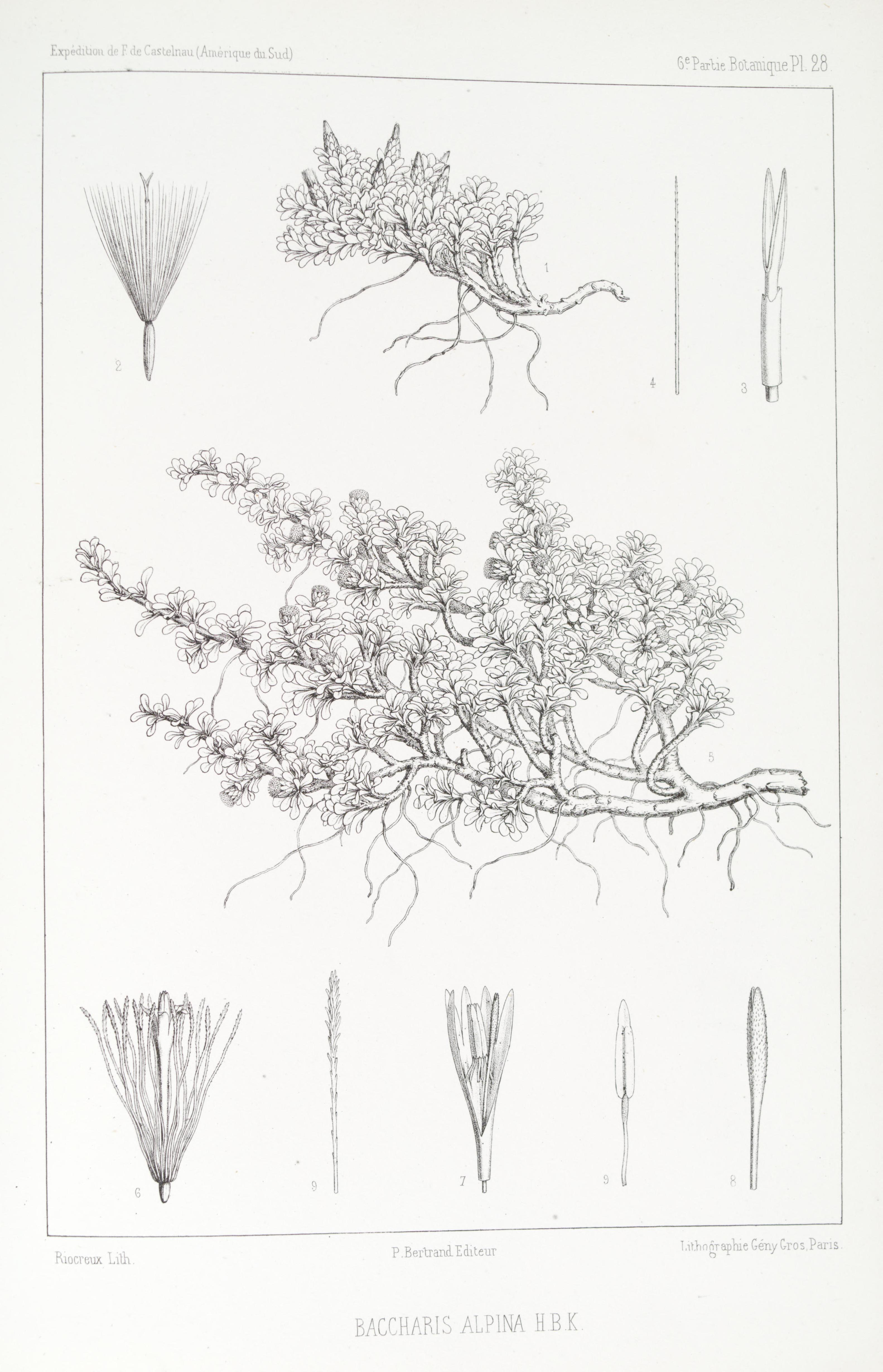 Chloris andina :essai d'une flore de la région alpine des Cordillères de l'Amérique du Sud /par H.A. Weddell.